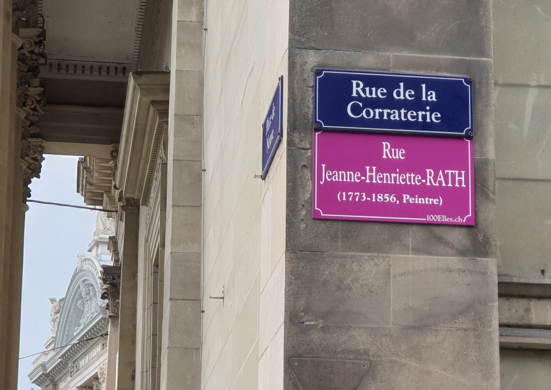 Plaque temporaire de rue apposée dans le cadre du projet 100elles à Genève en 2019